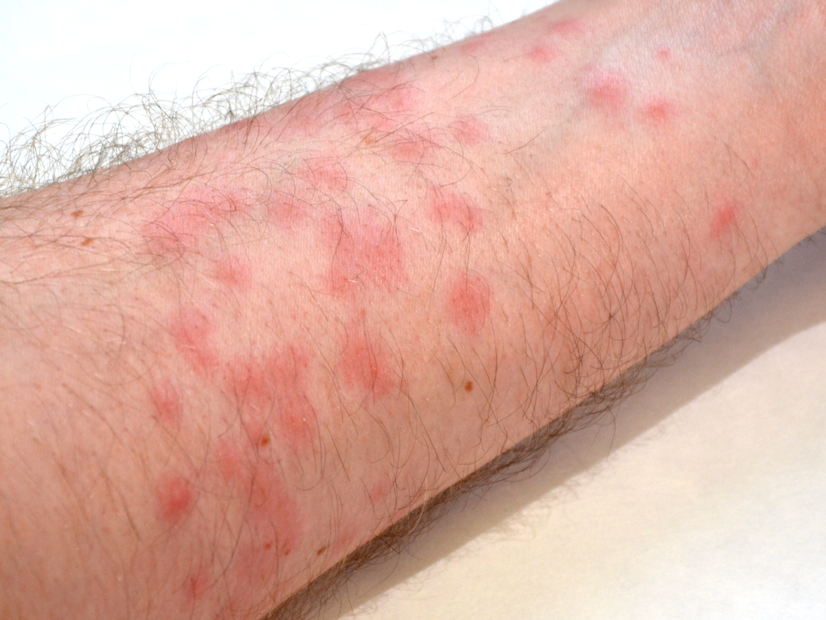 Cerkáriová dermatitida na předloktí, 1 den po expozici. Červené skvrny (makuly) na kůži osoby opakovaně vystavené cerkáriím Trichobilharzia szidati.